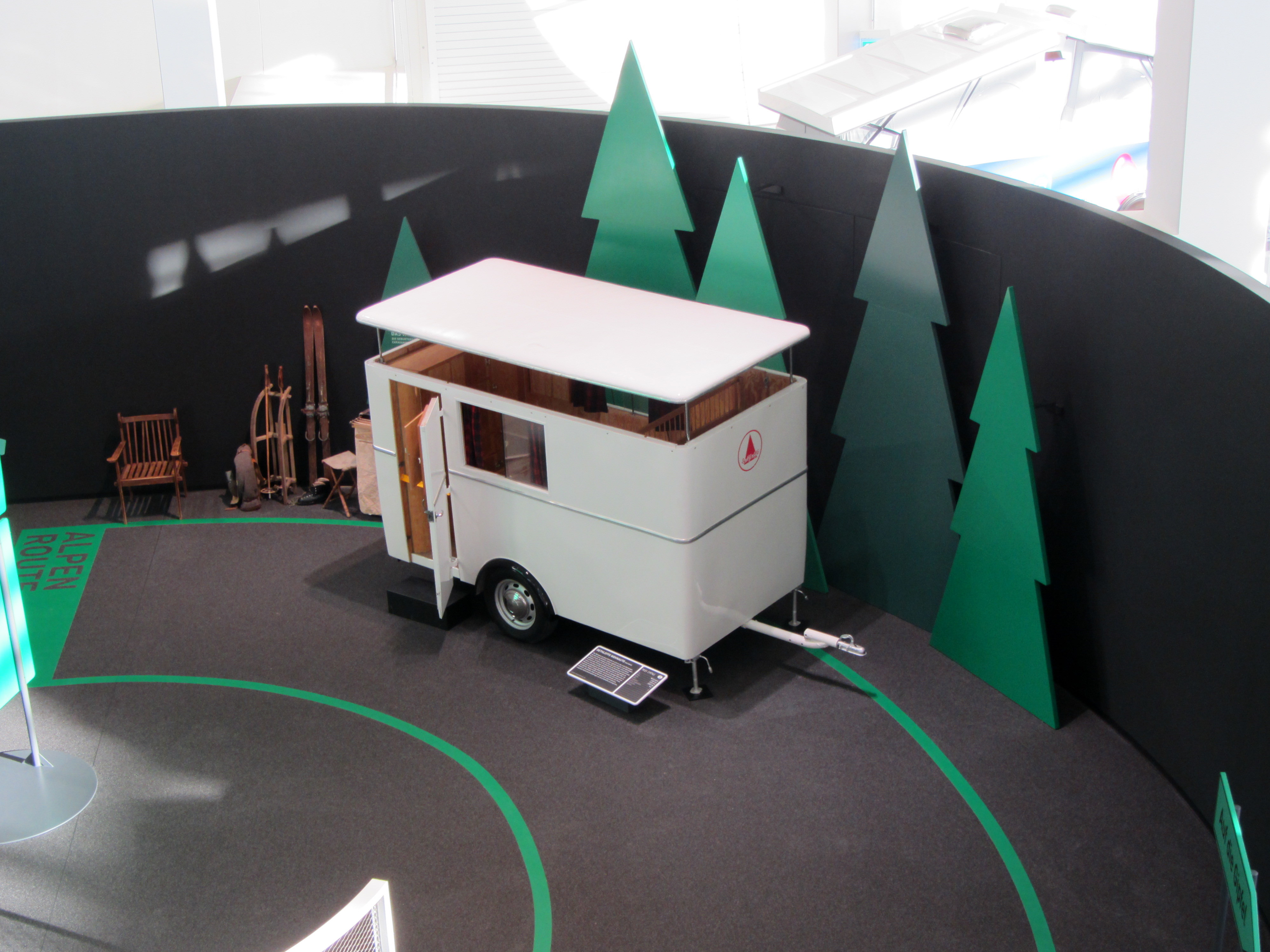 Dethleffs Wohnauto